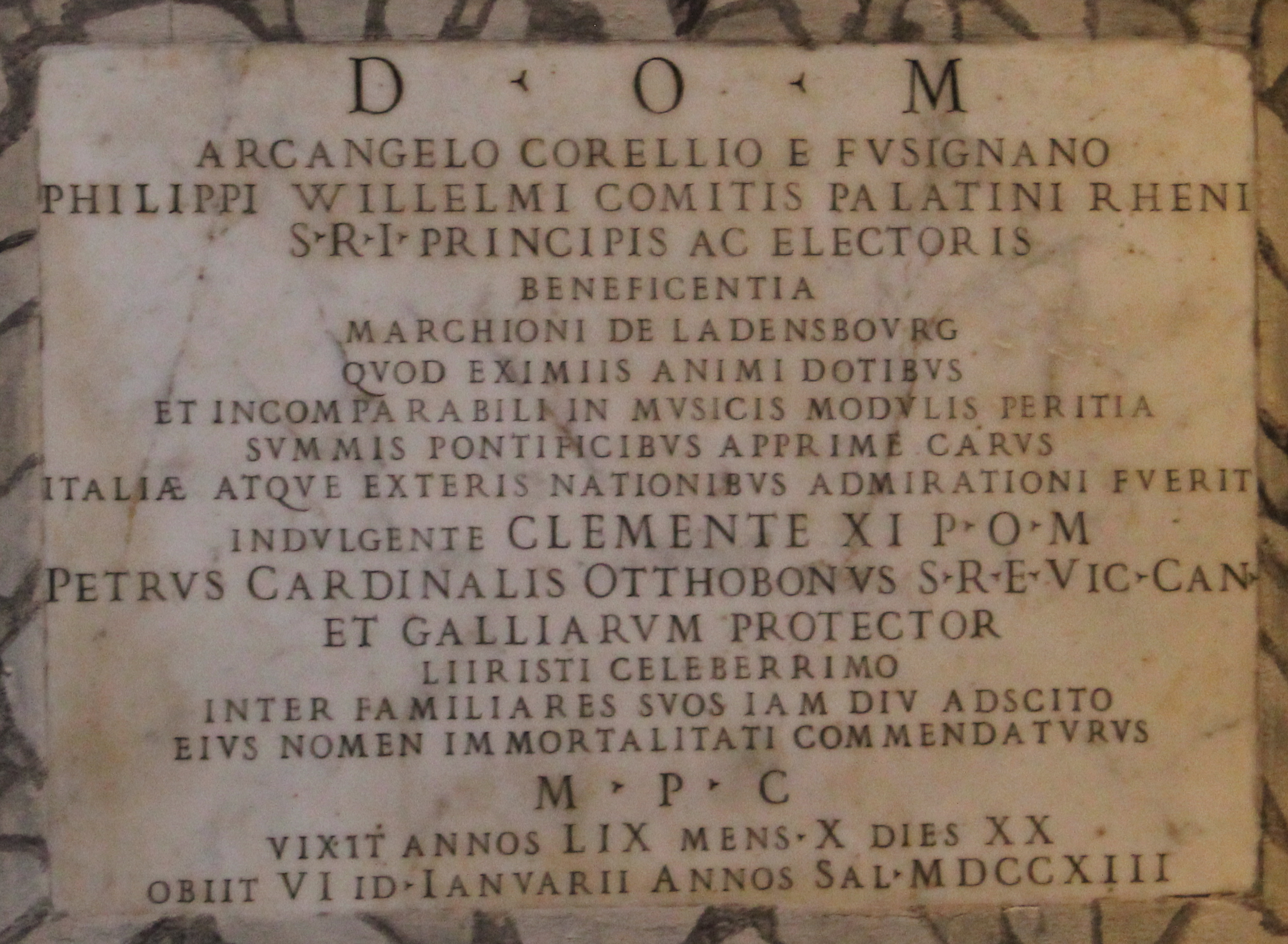 DOM ARCANGELO CORELLIO E FUSIGNANO PHILIPPI WILLELMI COMITIS PALATINI RHENI SRI PRINCIPIS AC ELECTORIS BENEFICENTIA MANCHIONI DE LADENSBOURG QUOD EXIMIIS ANIMI DOTIBUS ET INCOMPARABILI IN MUSICIS MODULIS PERITIA SUMMIS PONTIFICIBUS APPRIME CARUS ITALIAE ATQUE EXTRIS NATIONIBUS ADMIRATIONI FUERIT INDULGENTE CLEMENTE XI POM PETRUS CARDINALIS OTTHOBONUS SRE VIC CAN ET GALLIARUM PROTECTOR LIIRISTI CELEBERRIMO INTER FAMILIARES SUOS IAM DIV ADSCITO EIUS NOMEN IMMORTALITATI COMMENDATURUS M·P·C· VIXIT ANNOS LIX MENS X DIES XX OBIIT VI ID IANUARII ANNO SAL MDCCXIII